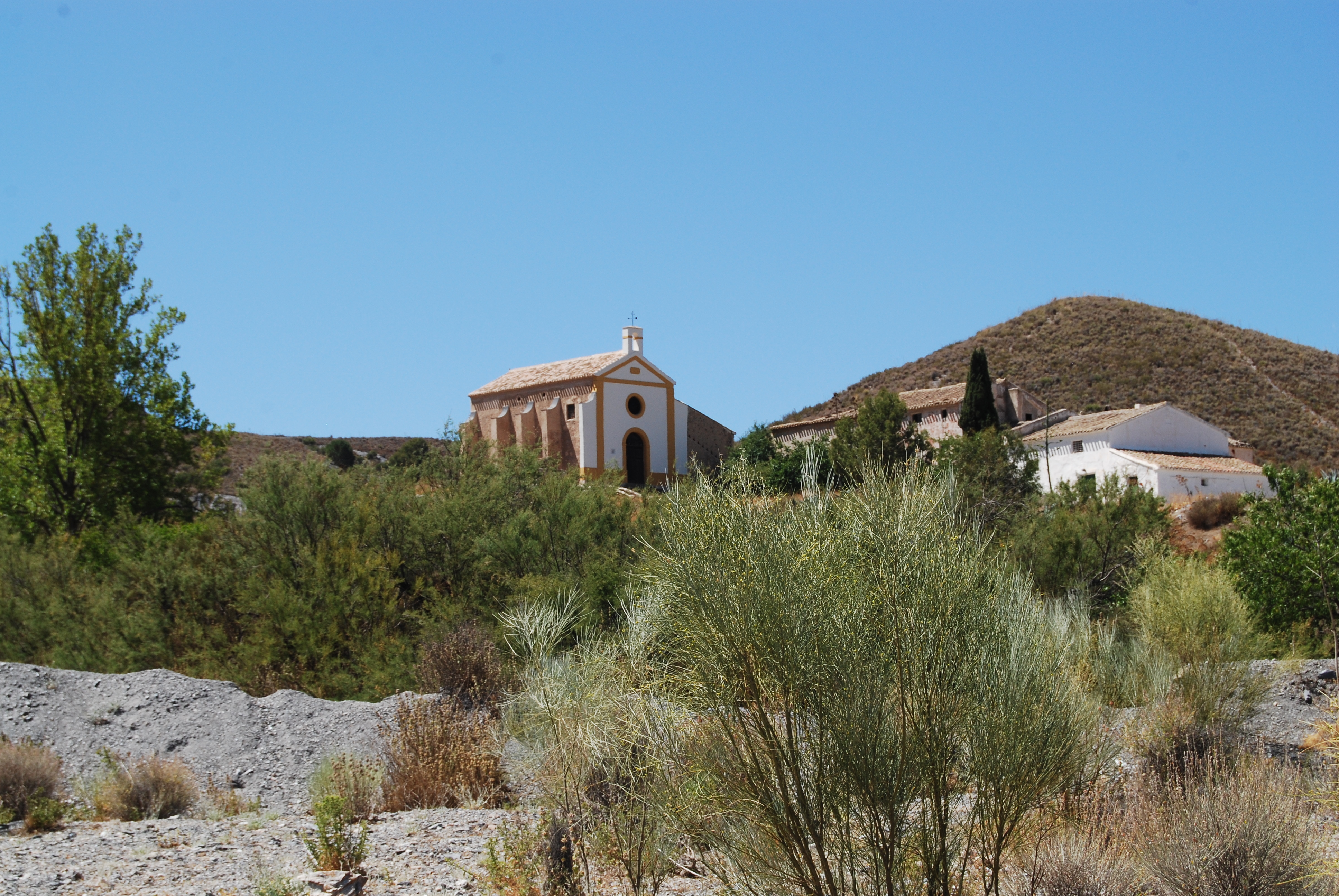 Vista desde de la Rambla de Cárdenas